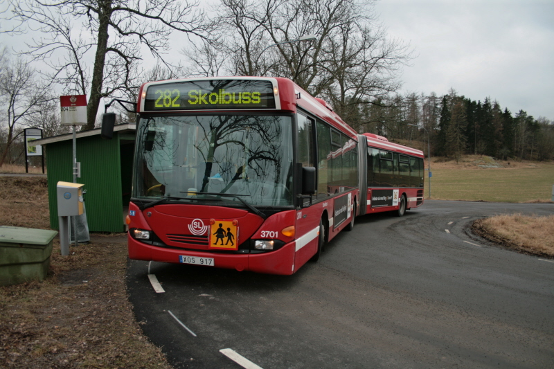 A Scania CL94UA6X2/2 OmniLink at Lidingö, Stockholm, Sweden. Year built 2006.